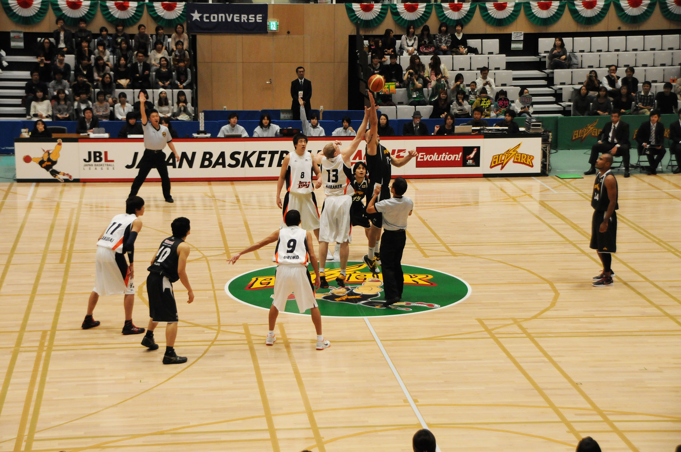 JBL 2010-2011シーズン、トヨタ自動車アルバルク対レラカムイ北海道。墨田区総合体育館で。